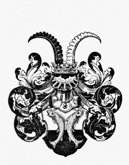 Wappen derer von Krutheim, einer morganatischen Nebenlinie des Fürstenhauses Salm-Reifferscheidt-Krautheim, 1827 verliehen bei Erteilung des badischen Adelsstandes